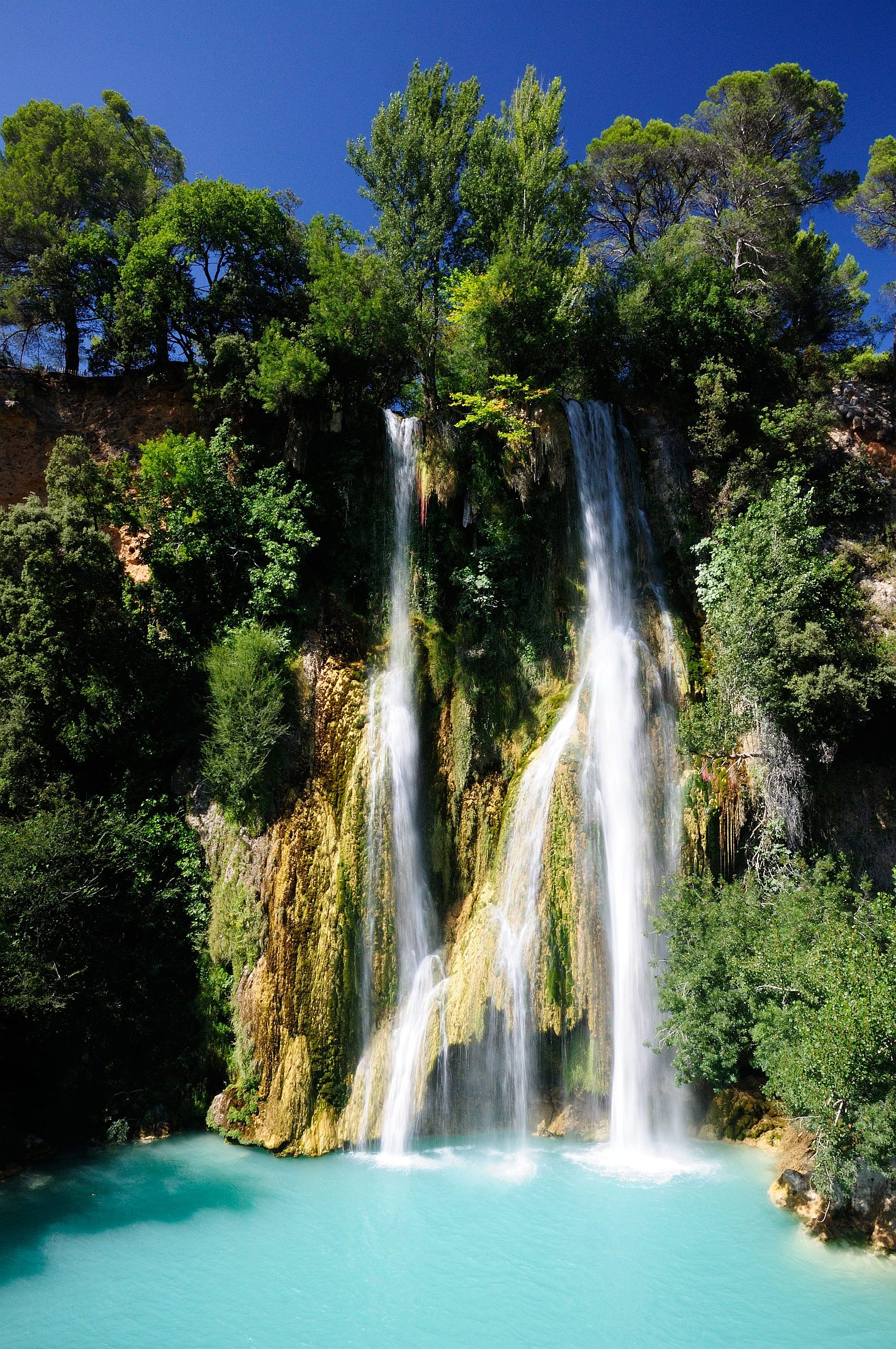 Blick auf den Wasserfall von der südlichen Aussichtsplattform aus